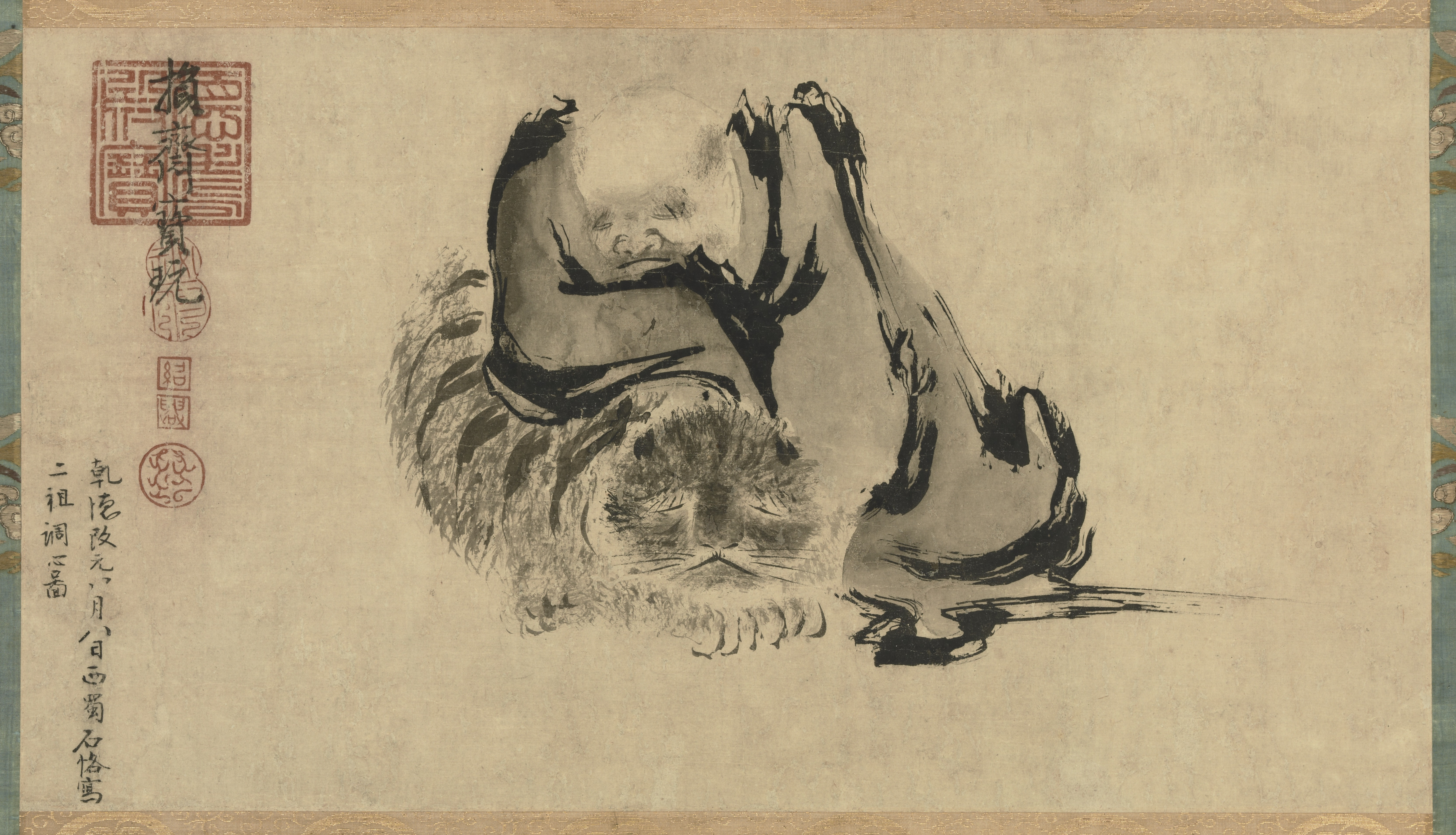 五代·石恪作品：二祖调心图